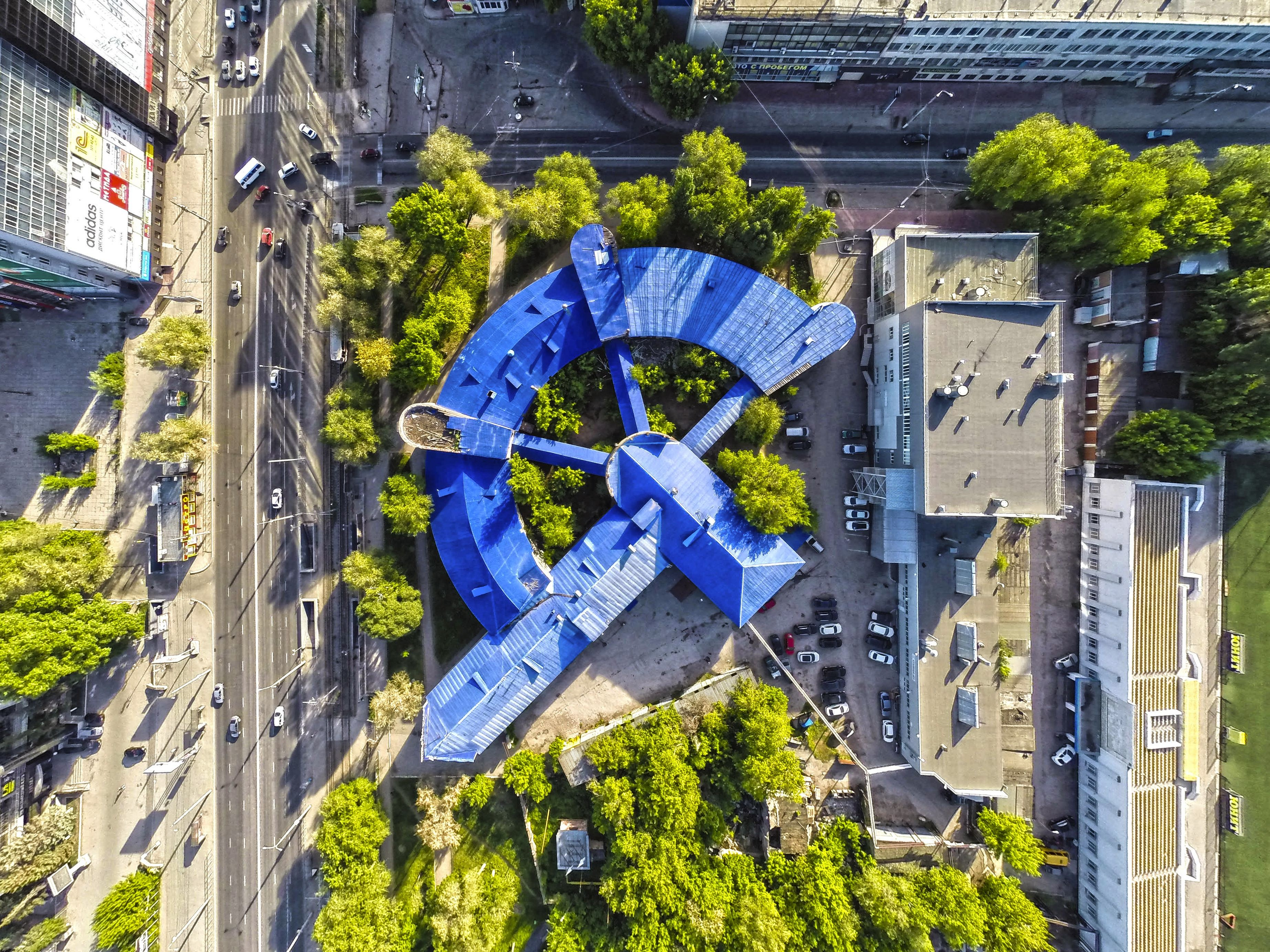 Фото фабрики-кухни в Самаре в плане